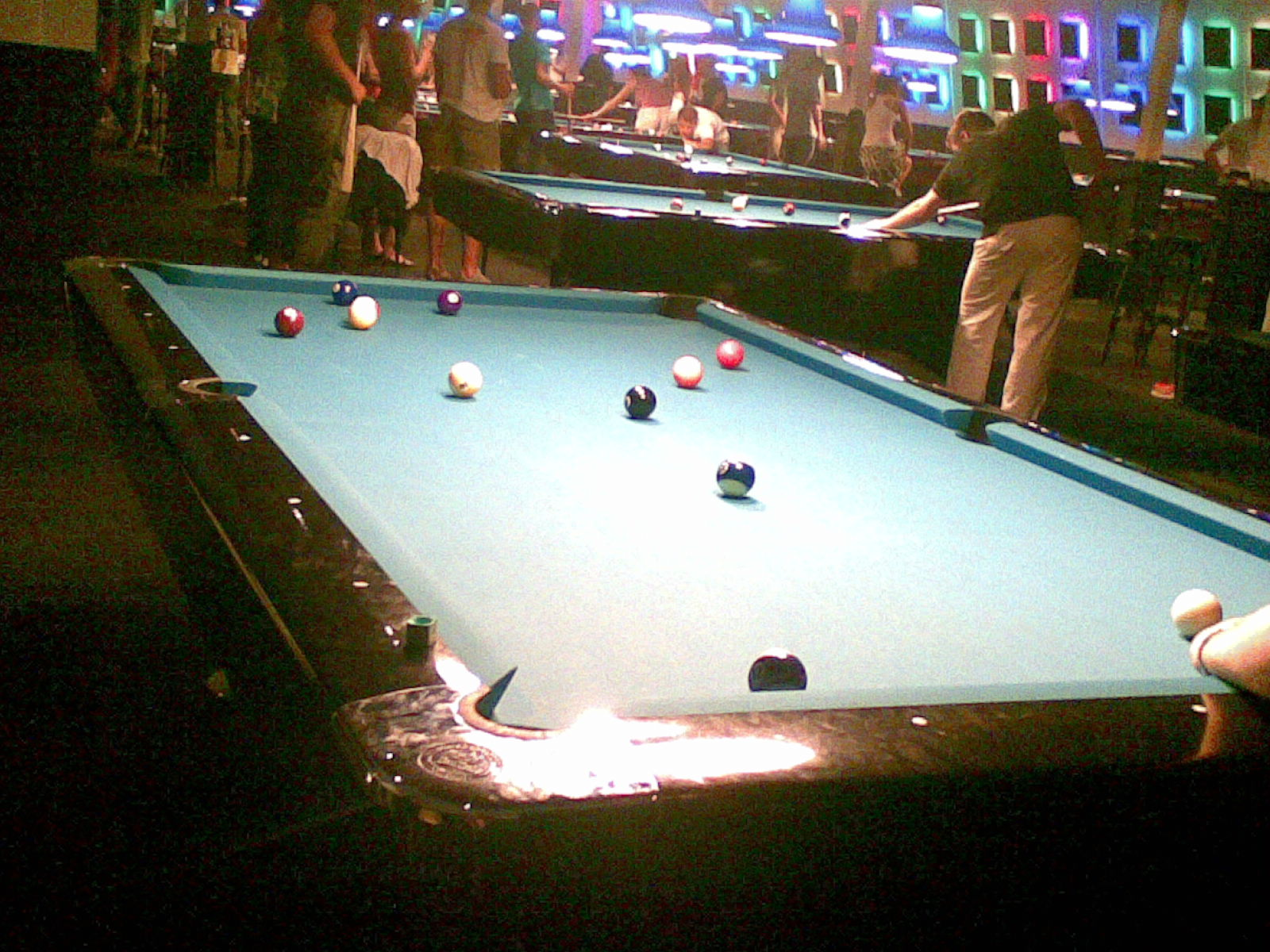 Een poolspel waar op gespeeld wordt